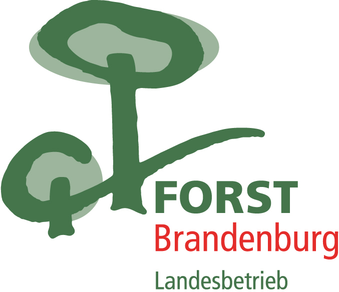 Logo des Landesbetriebes Forst Brandenburg